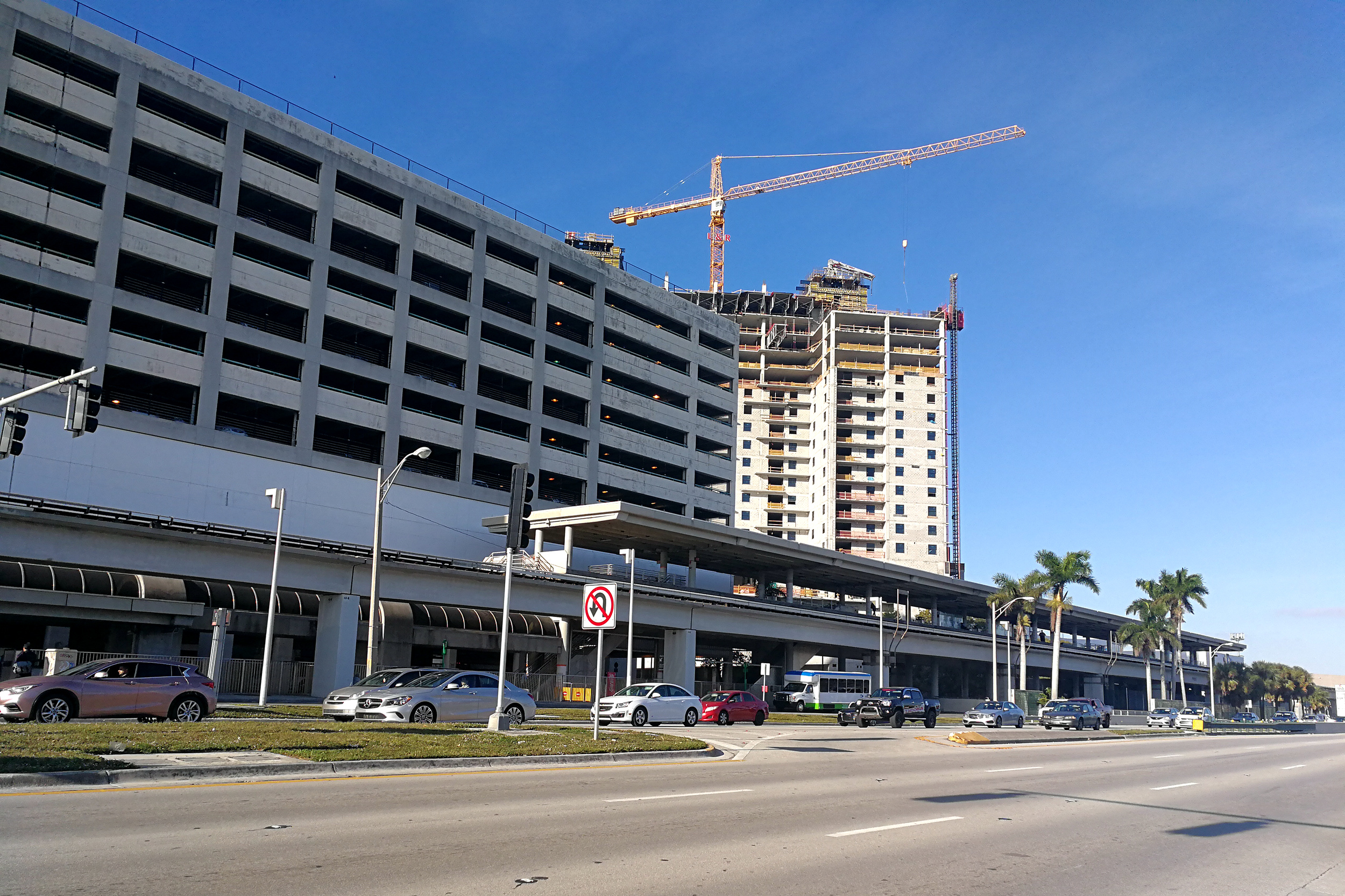 Dadeland North Station and it Parking Garage behind